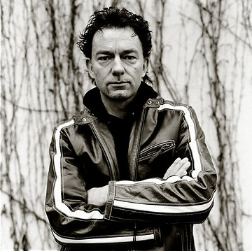 Mike KilianBildproduktion für das Musikmagazin "Melodie und Rhythmus"